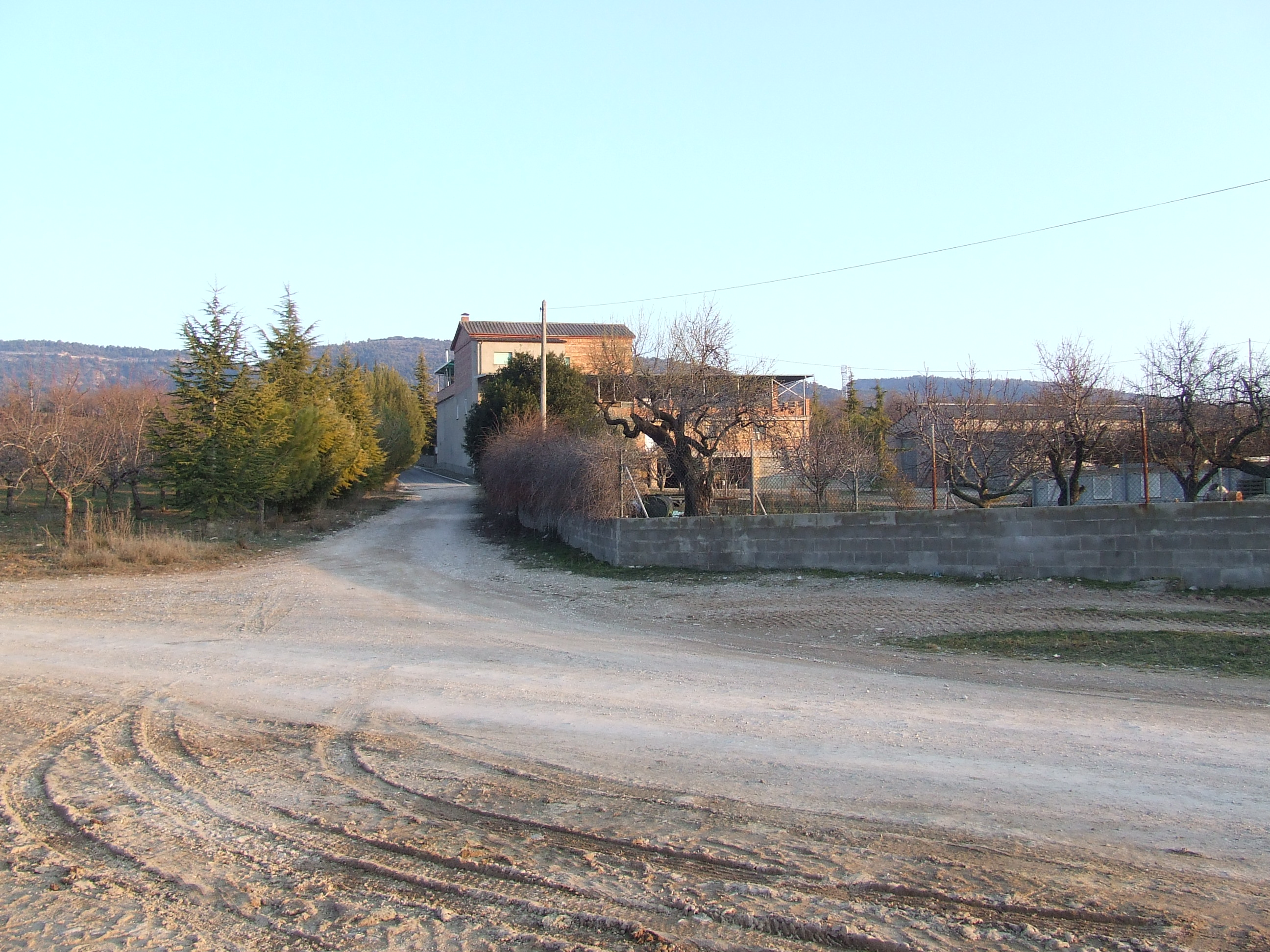 Cal Cuquerlo (Abella de la Conca, Pallars Jussà)